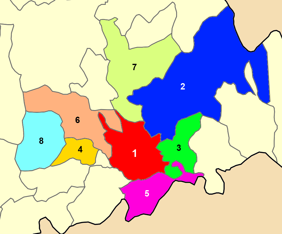 Χάρτης των ενοτήτων (και πρώην δήμων) από τις οποίες αποτελείται ο Δήμος Τρικαίων